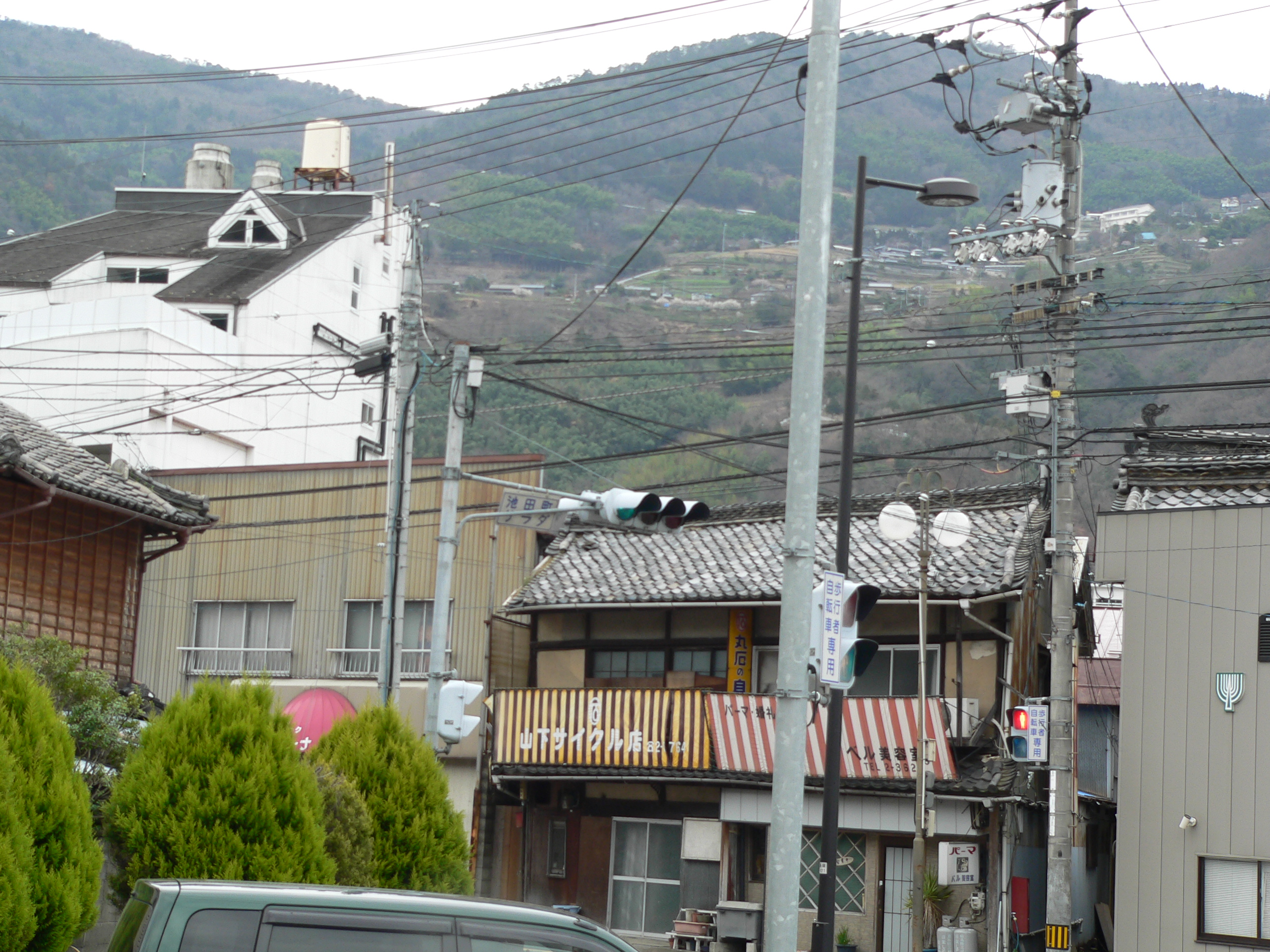 池田町サラダ交差点